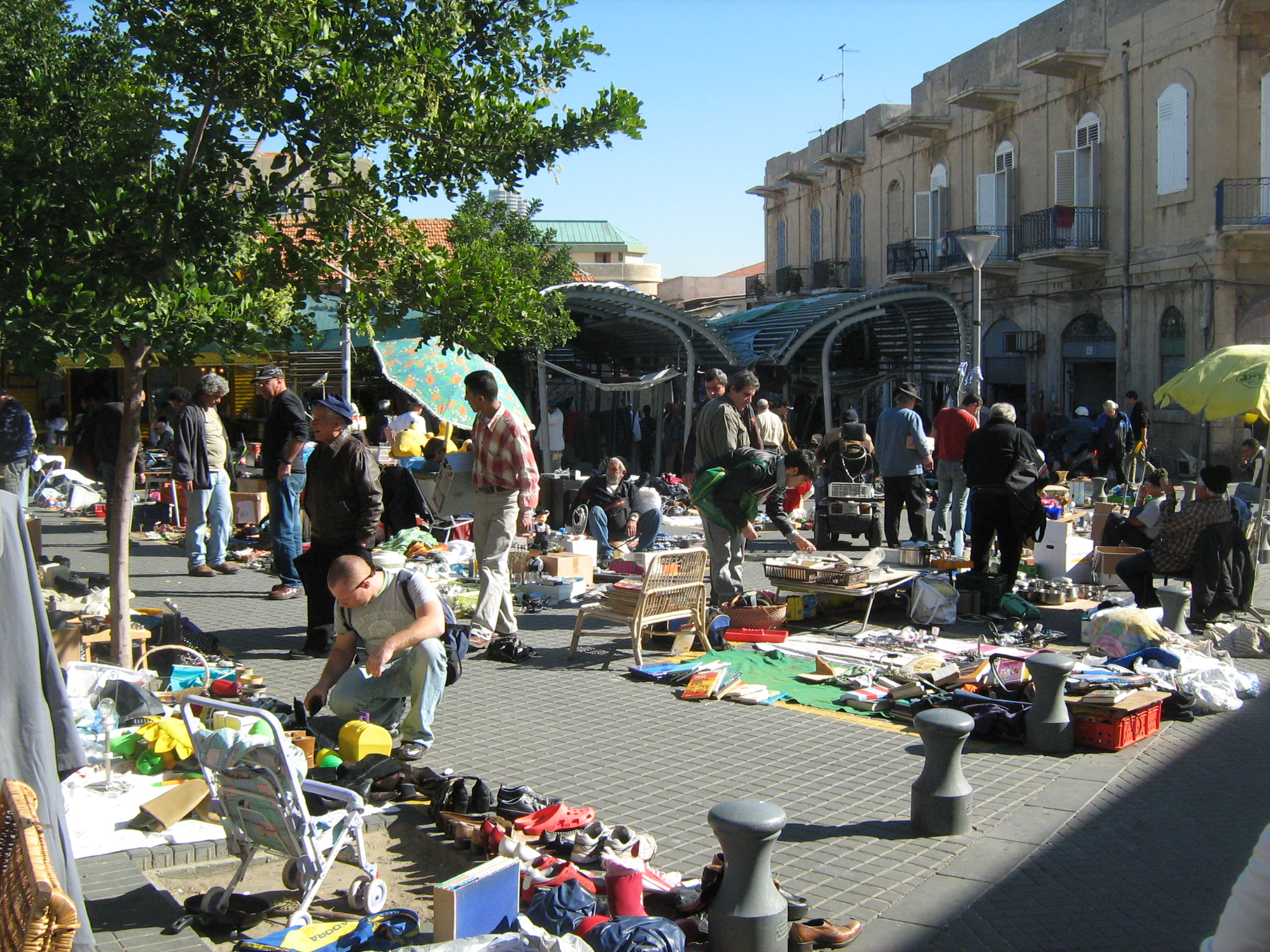 שוק הפשפשים ביפו